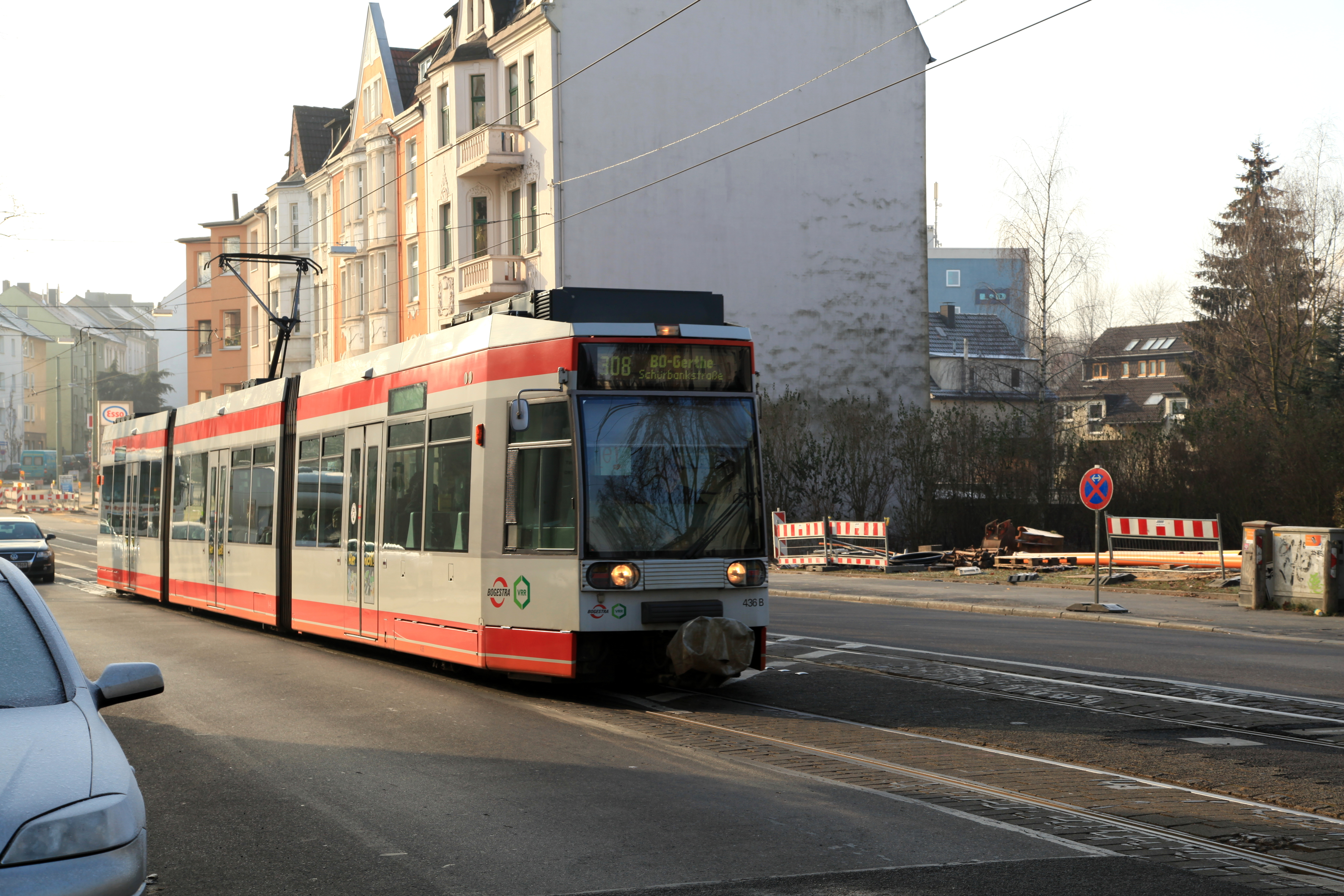 Hattinger Straße in Bochum